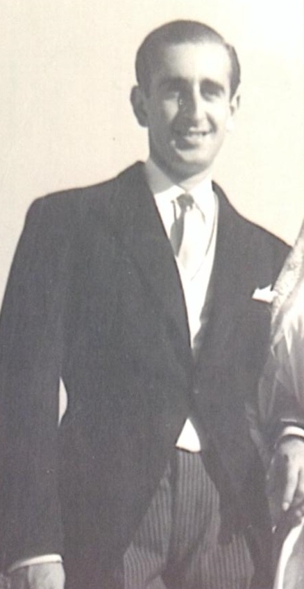 Fotografia de Miguel Ximenez